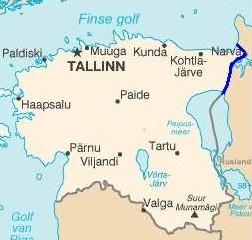 kaart ligging rivier, uit CIA kaart